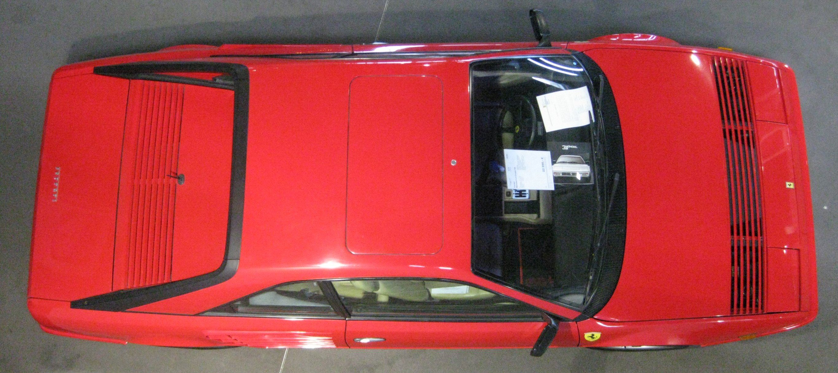 Blick senkrecht von oben auf einen Mondial 3.2